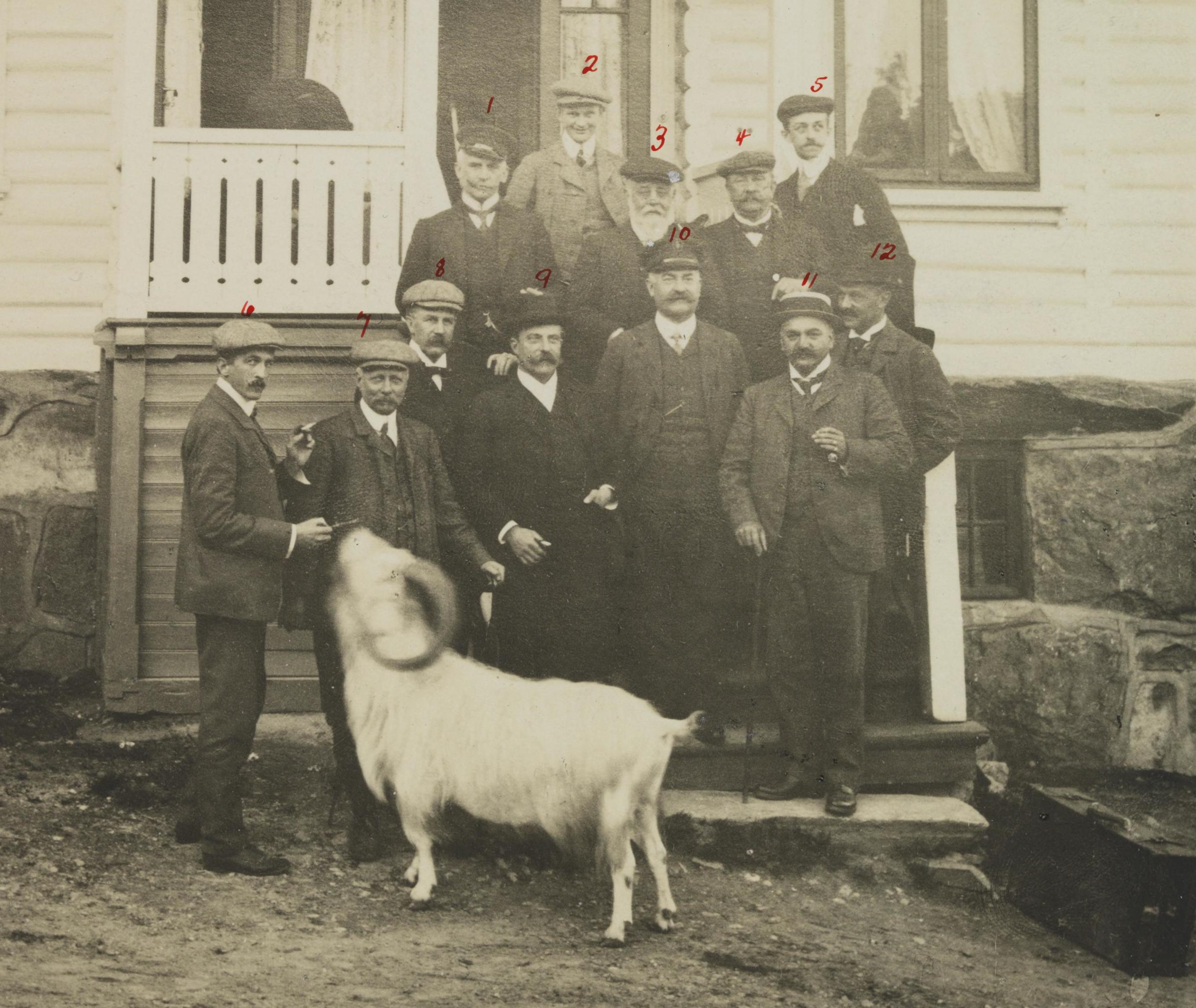 Bildet er hentet fra Nasjonalbibliotekets bildesamling Rjukan, Tinn, Telemark Depicted person: Eyde, Sam Depicted person: Klouman, Sigurd Depicted person: Böttinger, Henry Theodore Depicted person: Duisberg, Carl